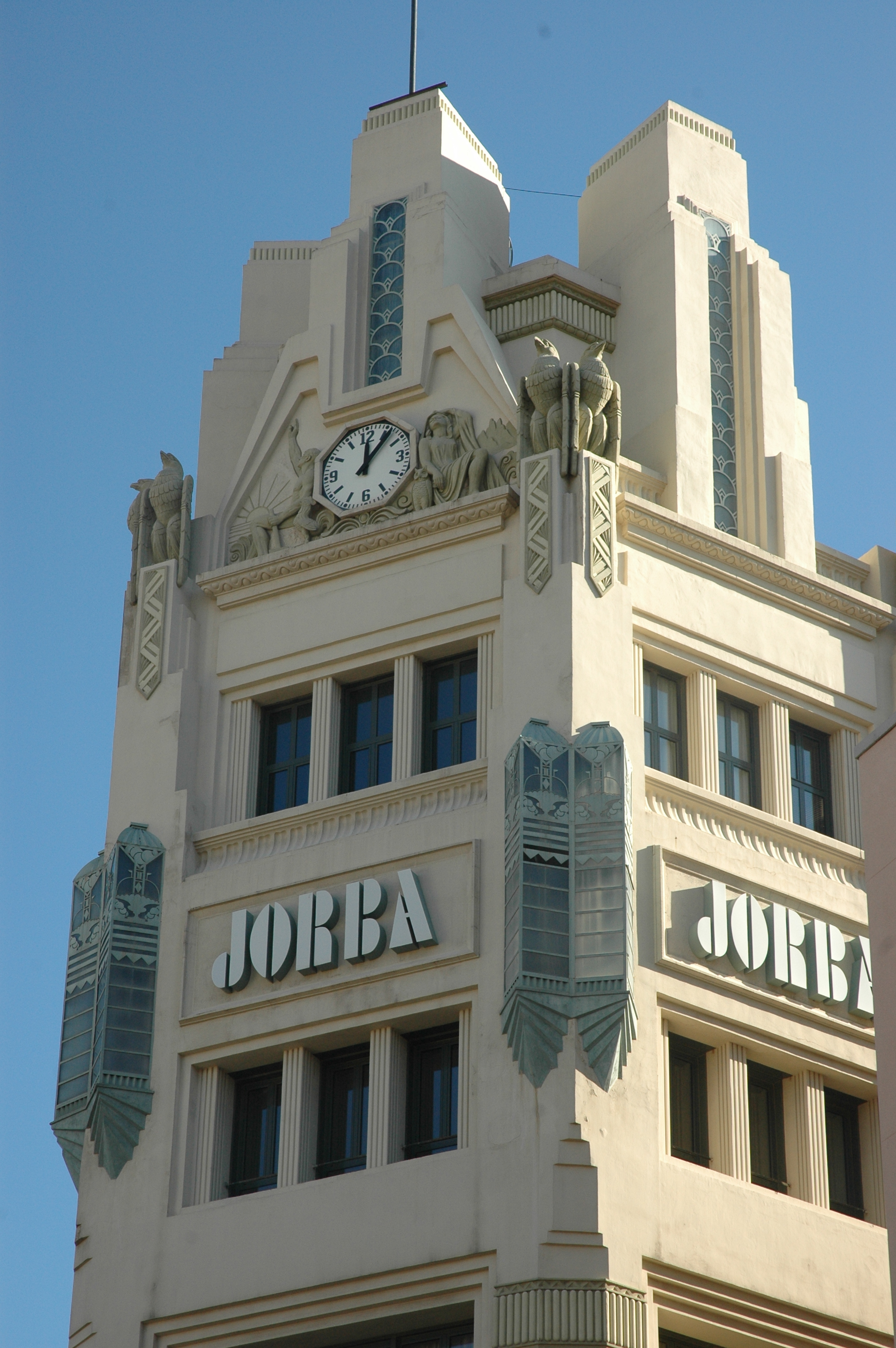 Manresa - Cal Jorba. Obra déco de Arnau Calvet i Peyronill (1930-40)